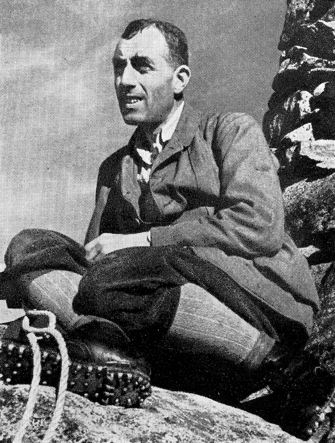 Boye Schlytter. Fjellklatrer. Portrett fra boka Norsk tindeklubb: Norsk fjellsport, Grøndahl, Oslo 1948